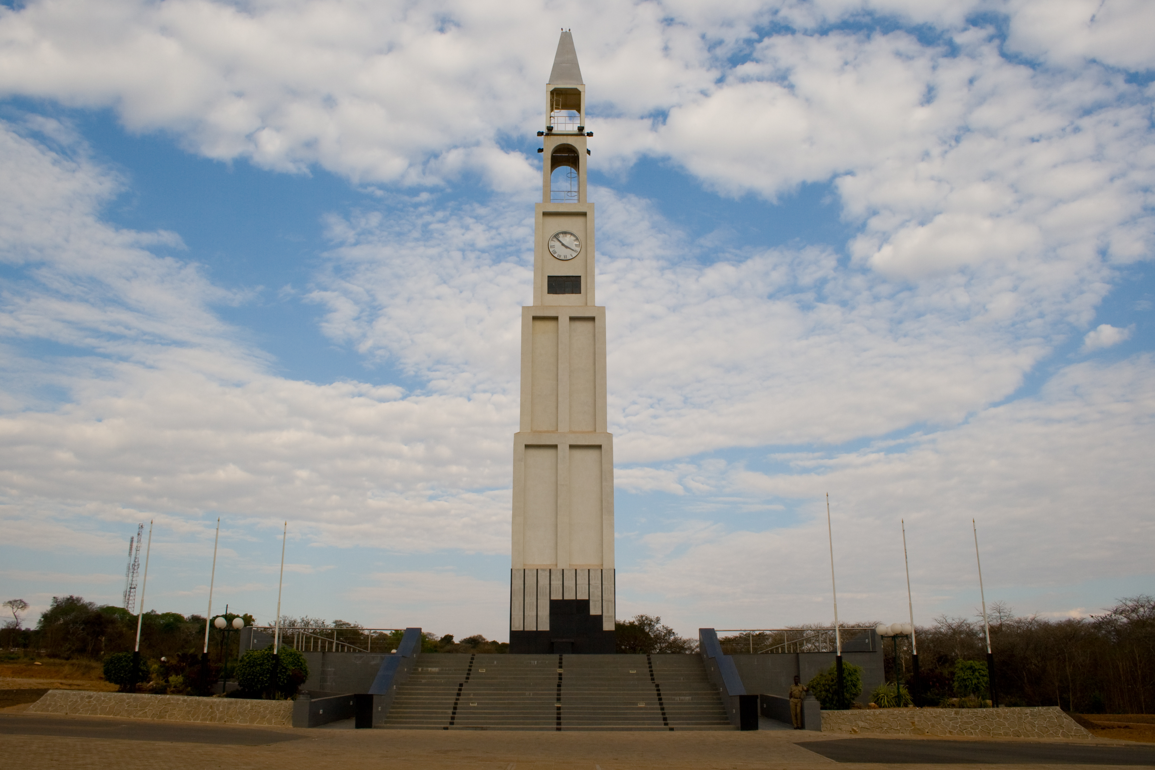 Gedenkstätte Clocktower für die gefallenen Soldaten des WWI und WWII in Lilongwe, Malawi